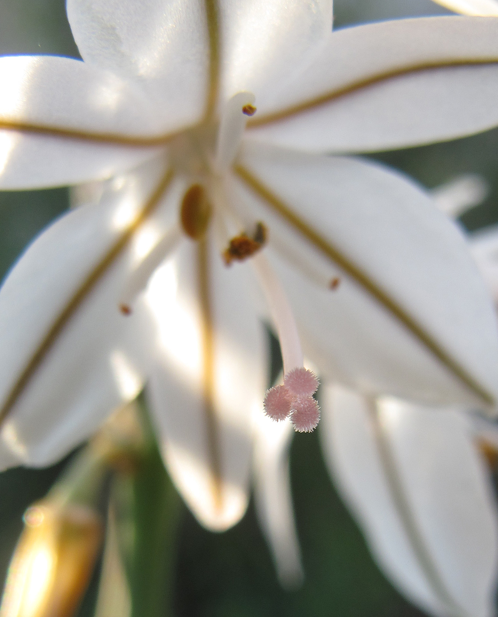 Pistilo con tres estigmas. Asphodelus cerasiferus.